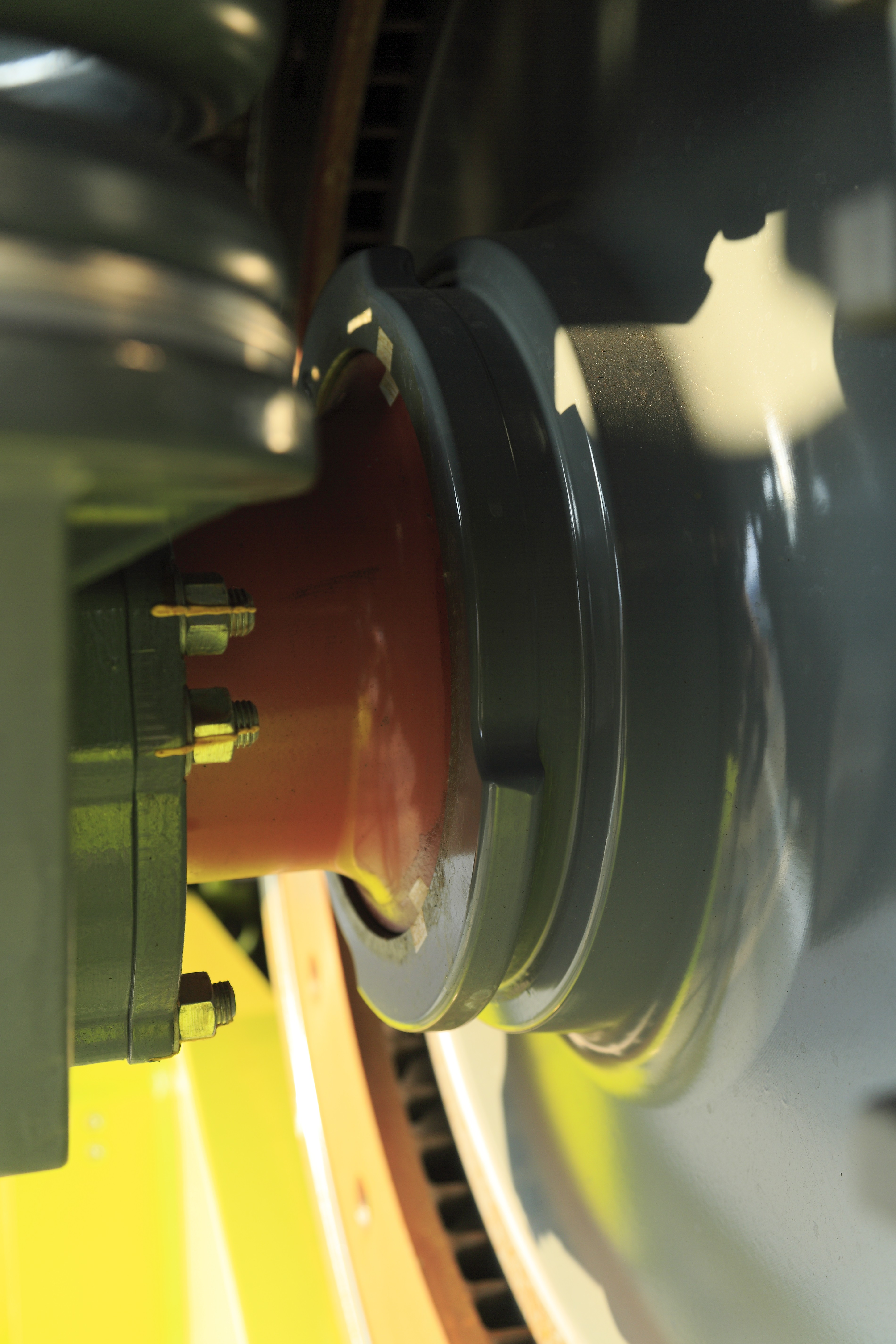 Die Drehgestelle sind so breit ausgelegt, dass auch Radsätze für iberische Breitspur einbaubar sind. Die langen Achsschenkel gleichen den Unterschied aus.